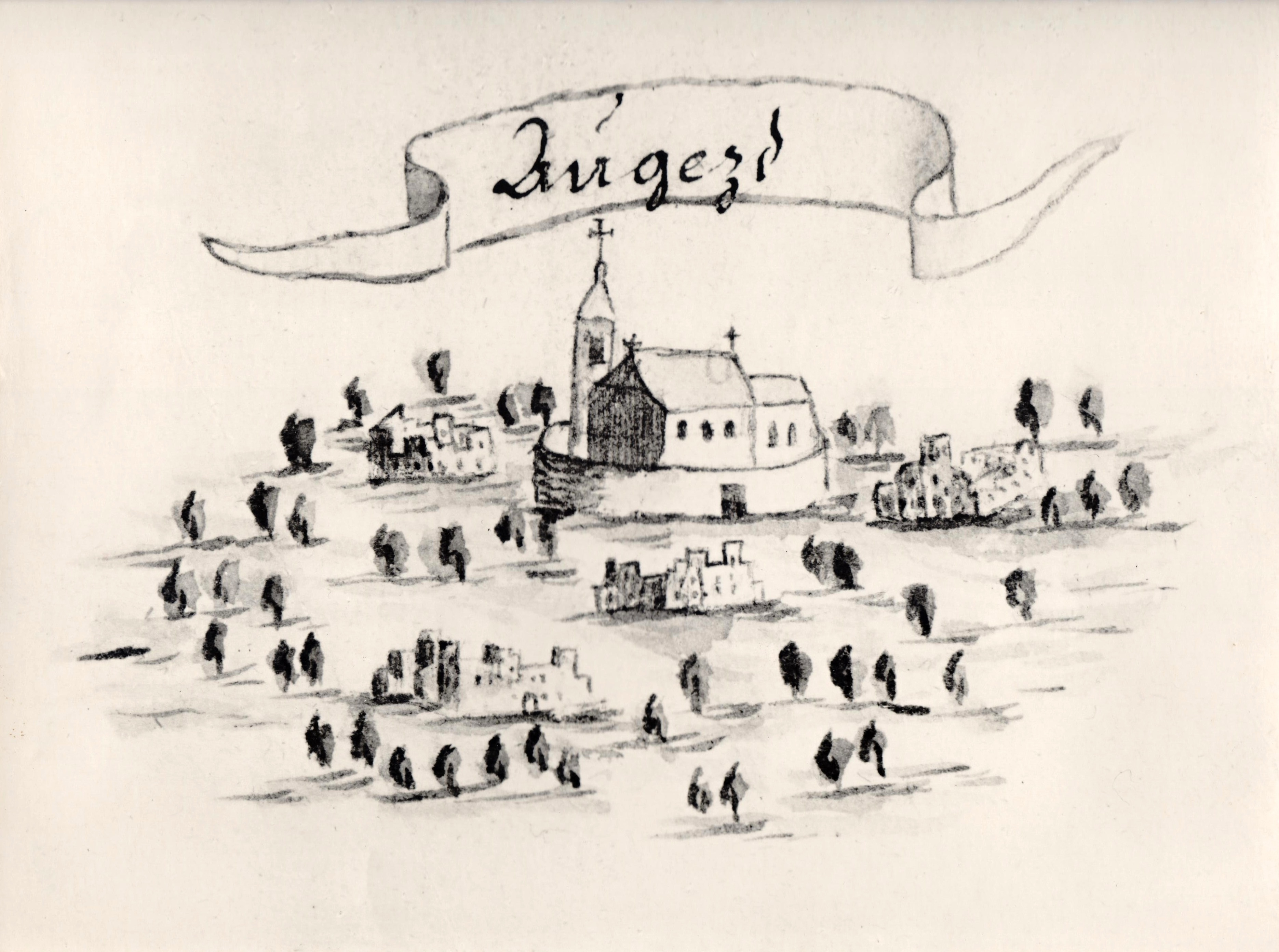 Kostel svatého Bartoloměje